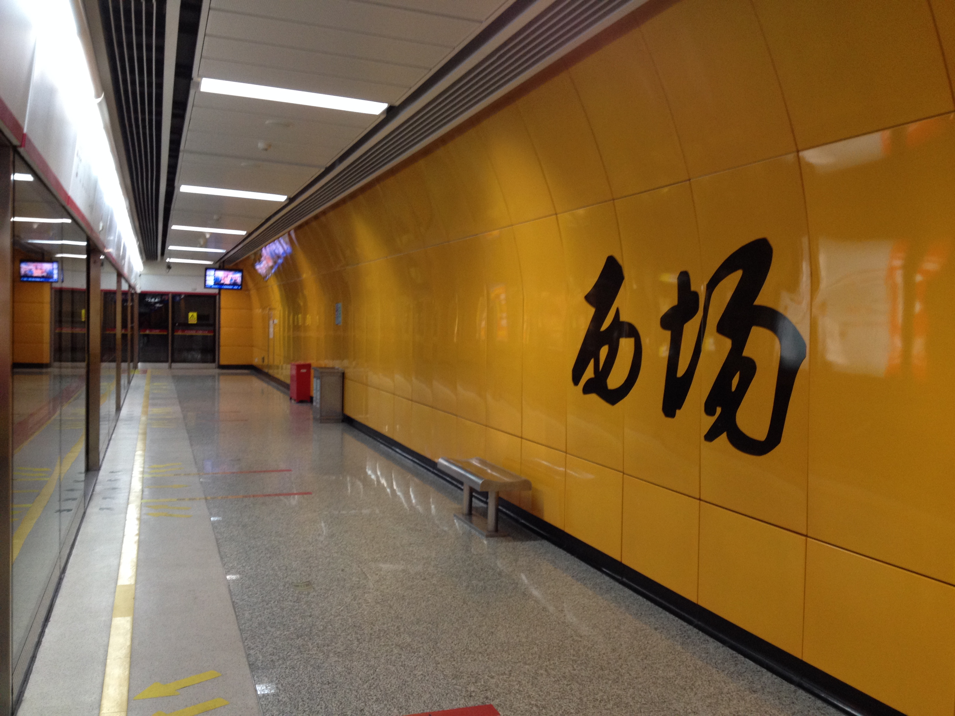 广州地铁西场站月台